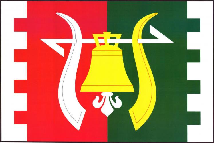 vlajka, Skřinářov, okres žďár nad Sázavou